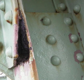 Korozijom izazvana oštećenja na trupu aviona, 31.0ktobar 2009.